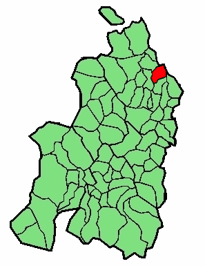 aipaturiko udalerriaren kokapena Nafarroa Beherean